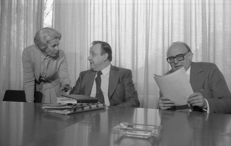 FDP-Bundesvorstand tagt im Bundeshaus